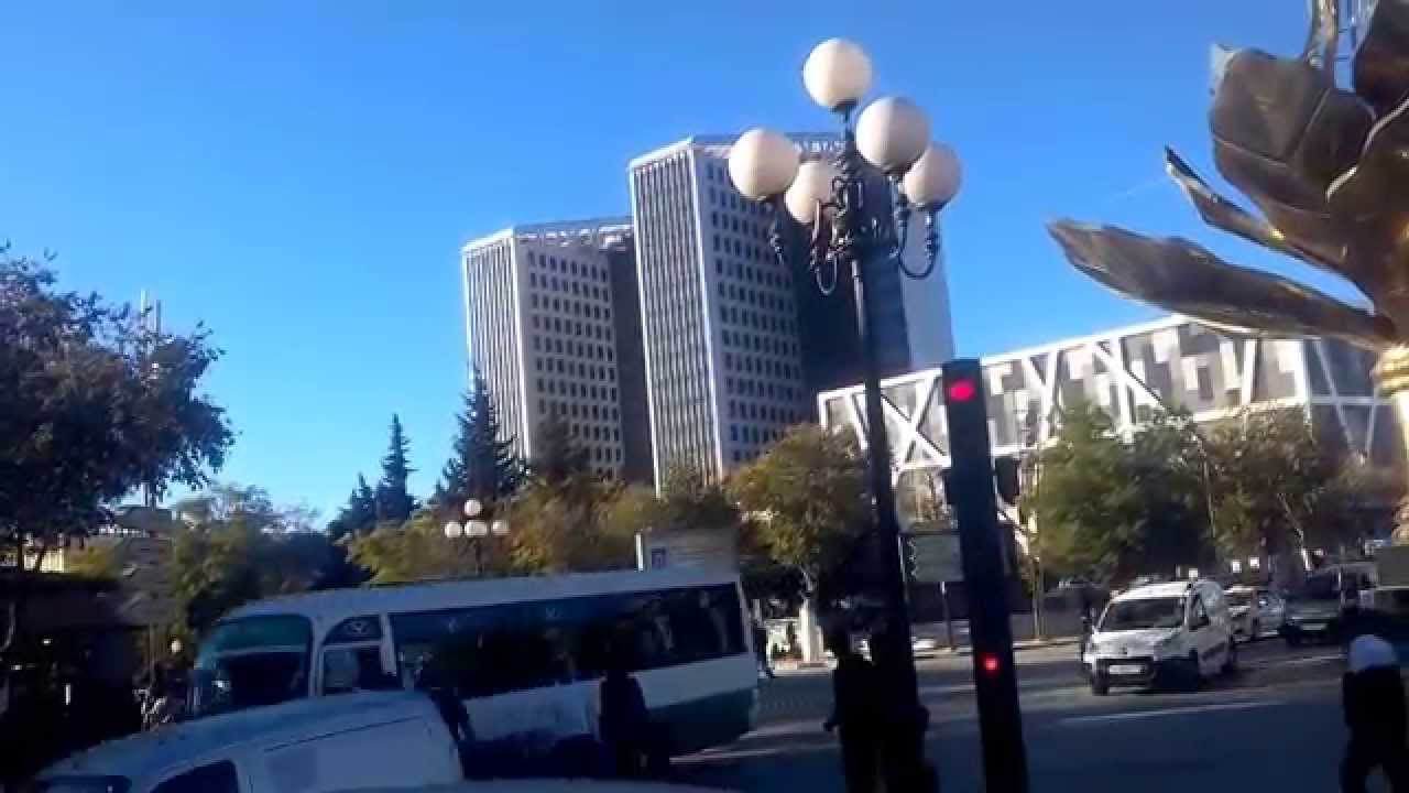 صورة بارك مول سطيف